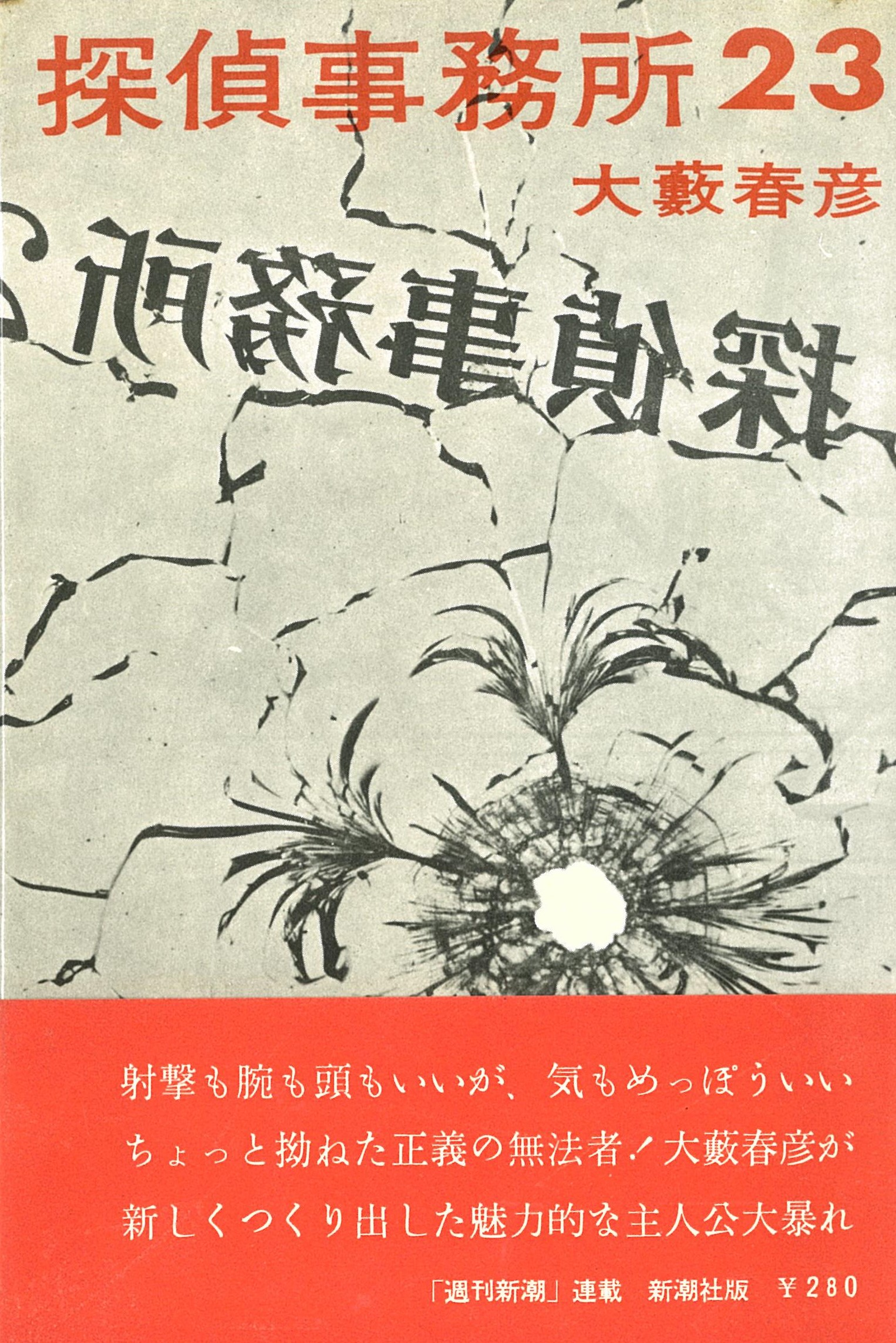 大藪春彦『探偵事務所23』新潮社版 1962年初版（装幀：上口睦人）